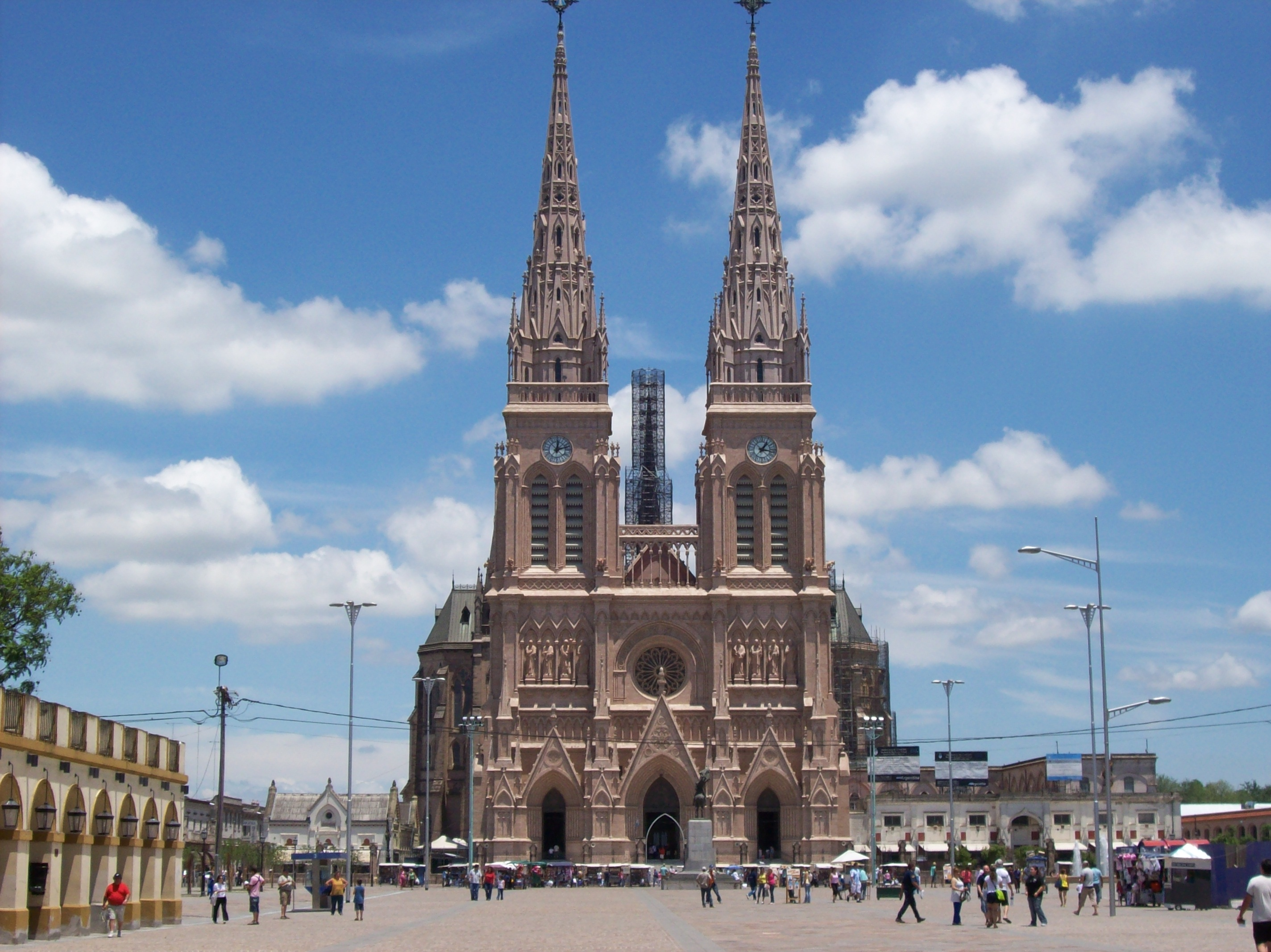 Frente de la Basílica Nuestra Señora de Luján, en Luján, provincia de Buenos Aires, Argentina.